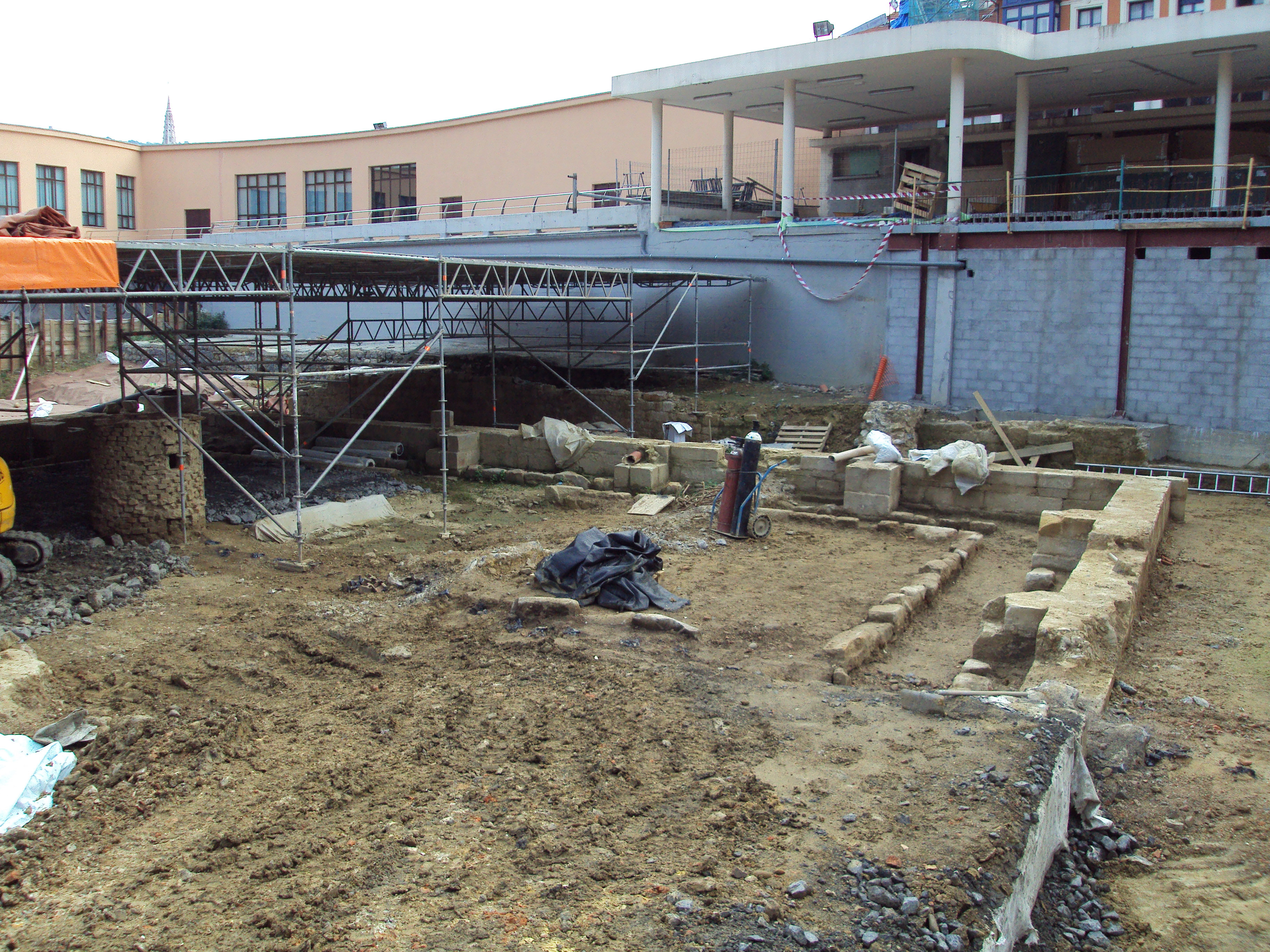 San Frantzisko Komentua